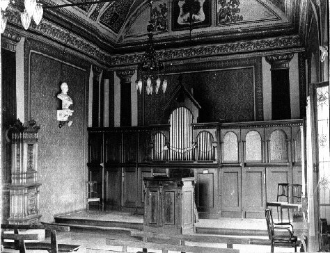 Freiherr-vom-Stein-Gymnasium (Weferlingen)